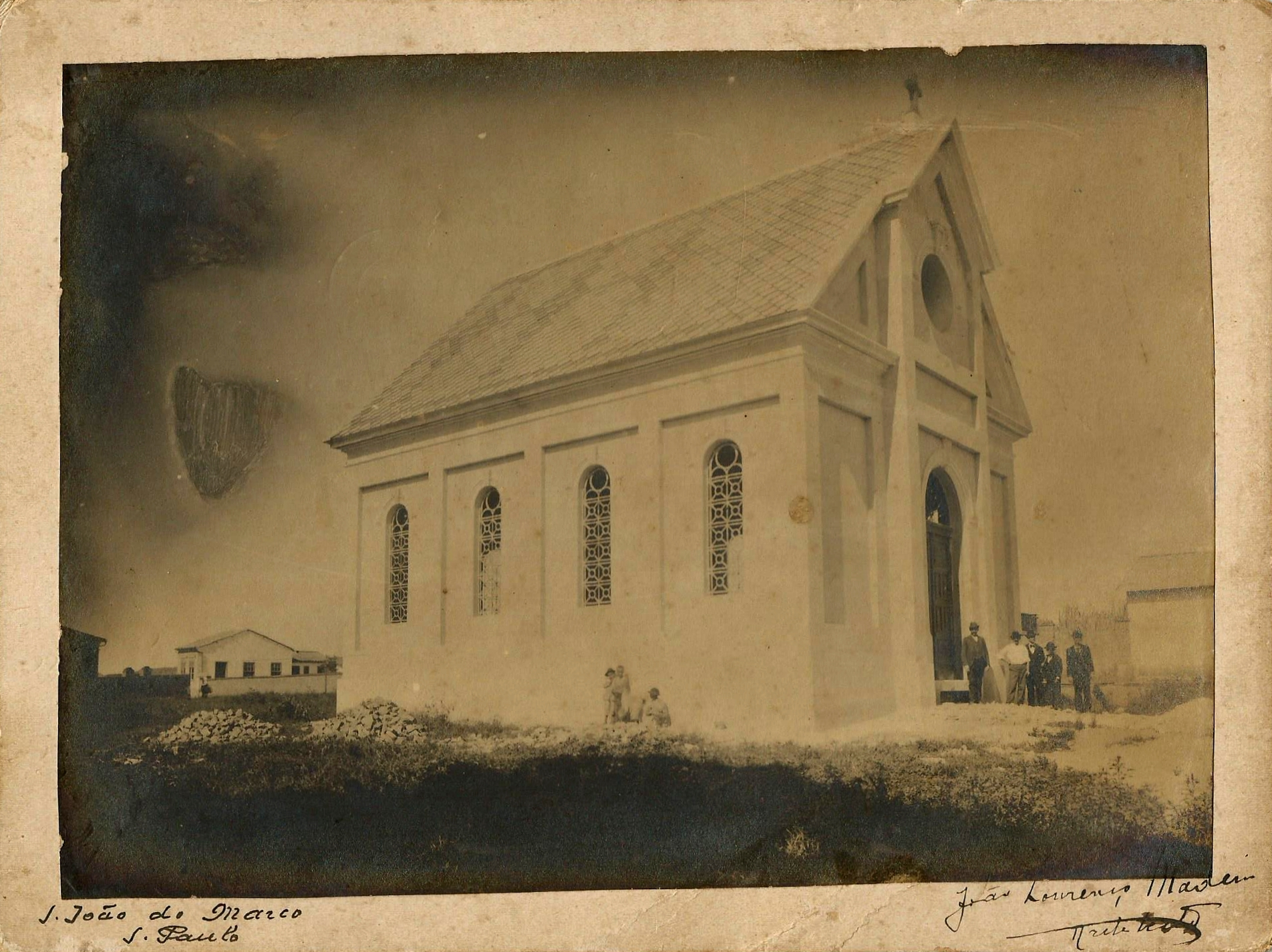 Igreja São João de Marco - Local desconhecido